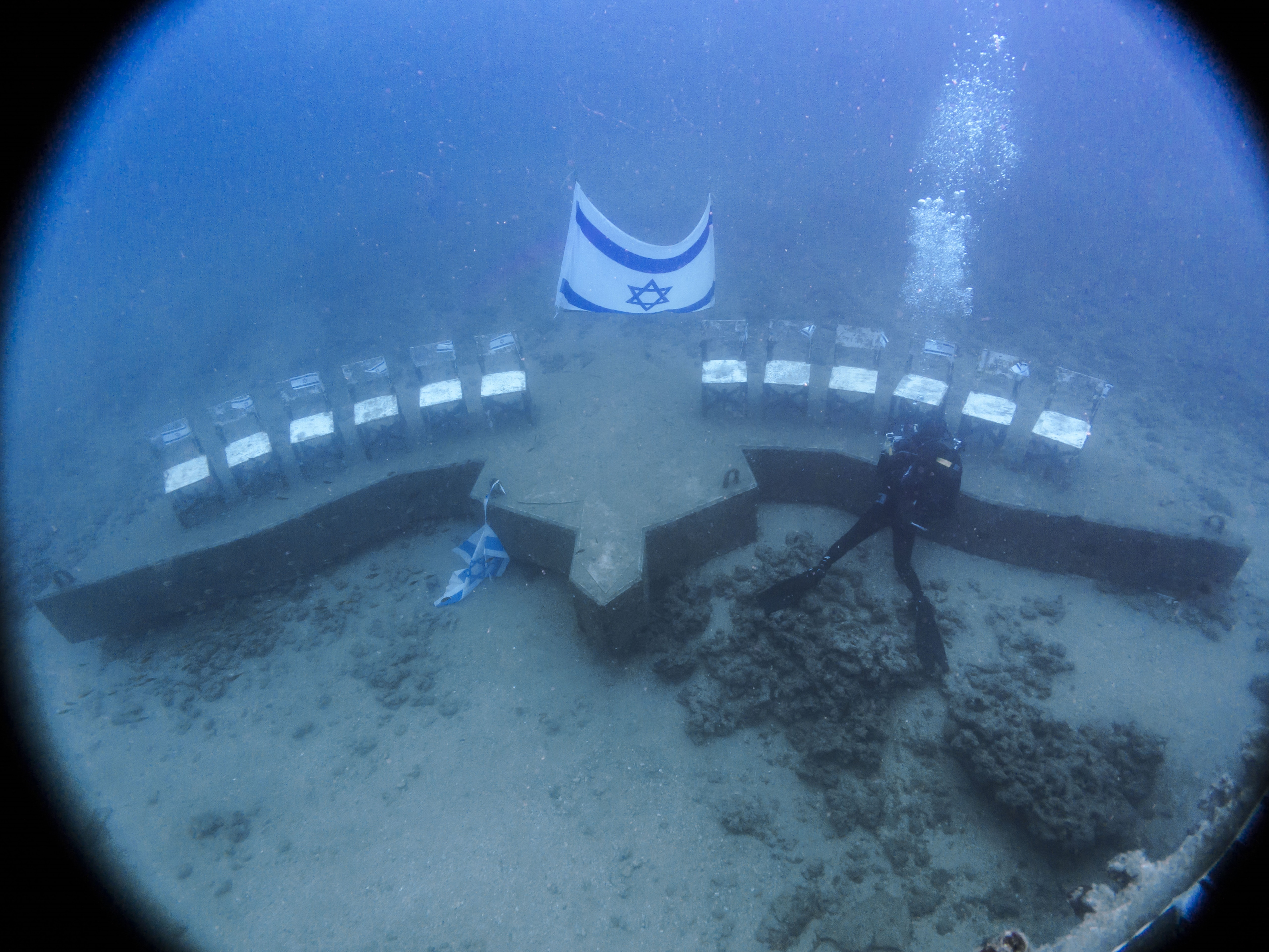 אנדרטה תת ימית לחללי אסון השייטת מול חוף שבי ציון